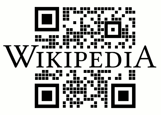 Extreme QR code linking to